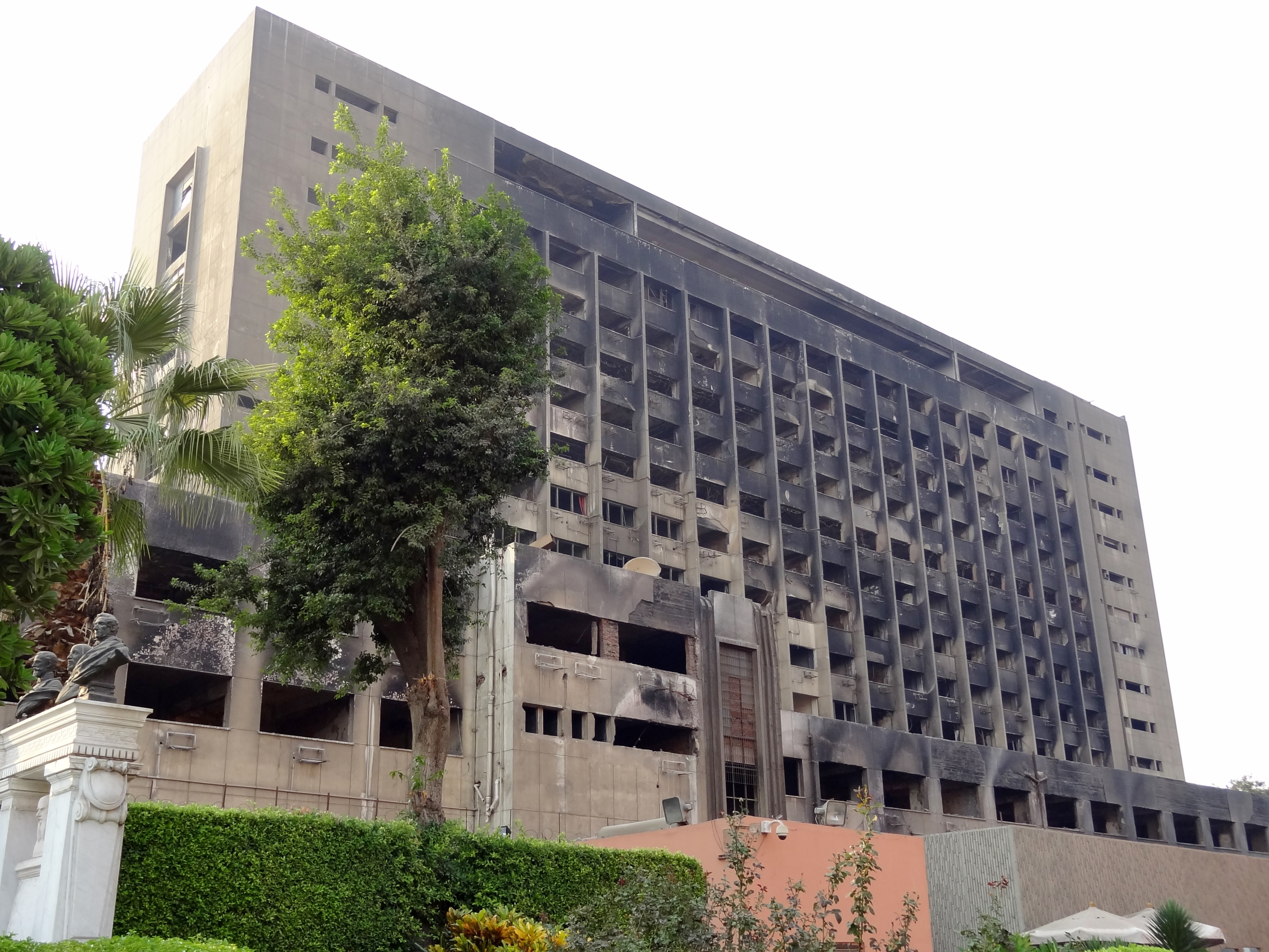 Ausgebranntes Gebäude der ehemaligen Nationaldemokratischen Partei neben dem Tahrir-Platz in Kairo, Ägypten